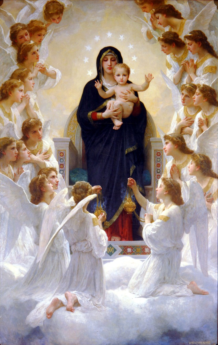 La Vierge avec les anges